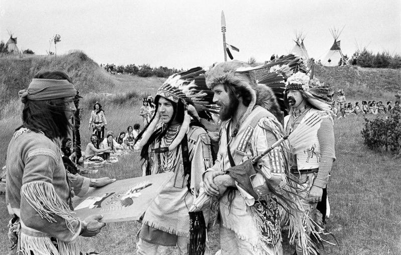 ADN-ZB / Pätzold / 3.7. 82 / Bez. Schwerin: 25. Indianistiktreffen Zum 25. "Indian Council 1982" trafen sich an der Ellerbäk bei Gadebusch rund 260 Mitglieder von Kulturgruppen für Indianistik aus allen Teilen der DDR. In der Republik widmen sich 31 Gruppen mit mehreren hundert Mitgliedern der Erkundung des Lebens der Indianer und deren vielschichtigen Kultur.